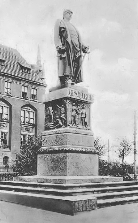 Bismarckdenkmal in Essen, Bismarckplatz